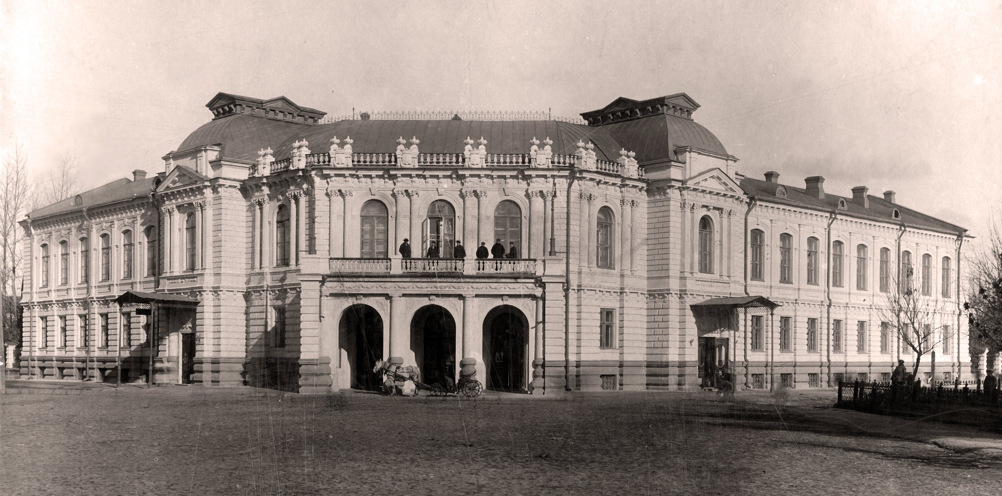 Рабочий дворец бывшее дворянское собрание